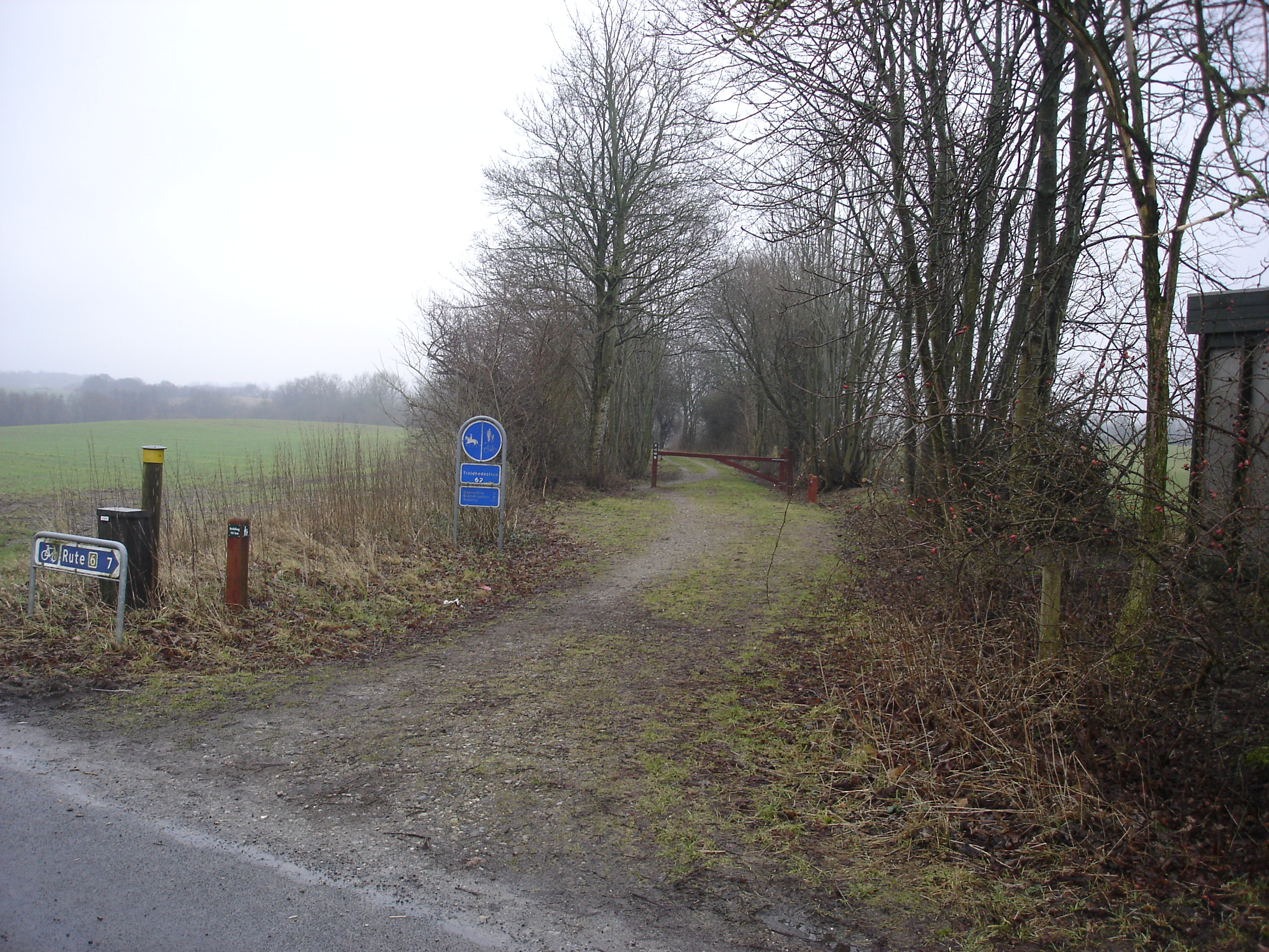 Troldhedebanestien starter mod Ø fra Harager i Ferup